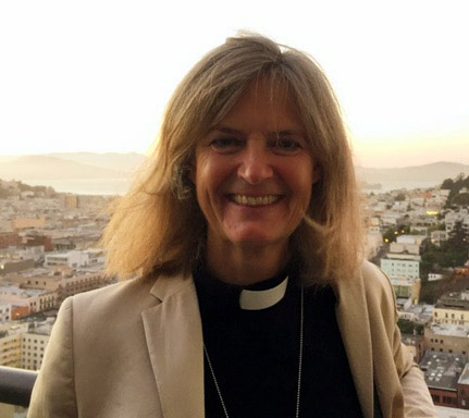 Louise Linder i San Francisco 2016